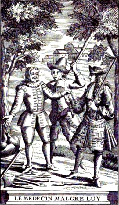 Front page of Le Médecin malgré lui (1666) by Molière (1622-1673)